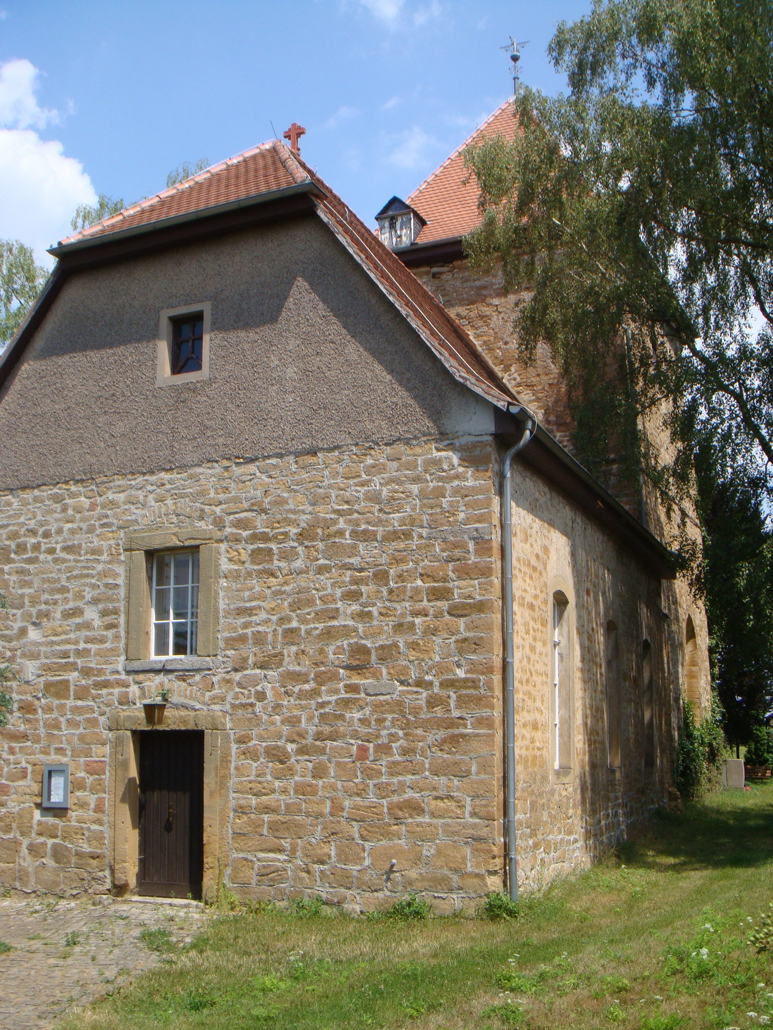 Daasdorf b.B. Dorfkirche